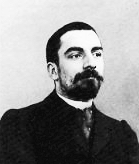 Louis Dimier, portrait en buste